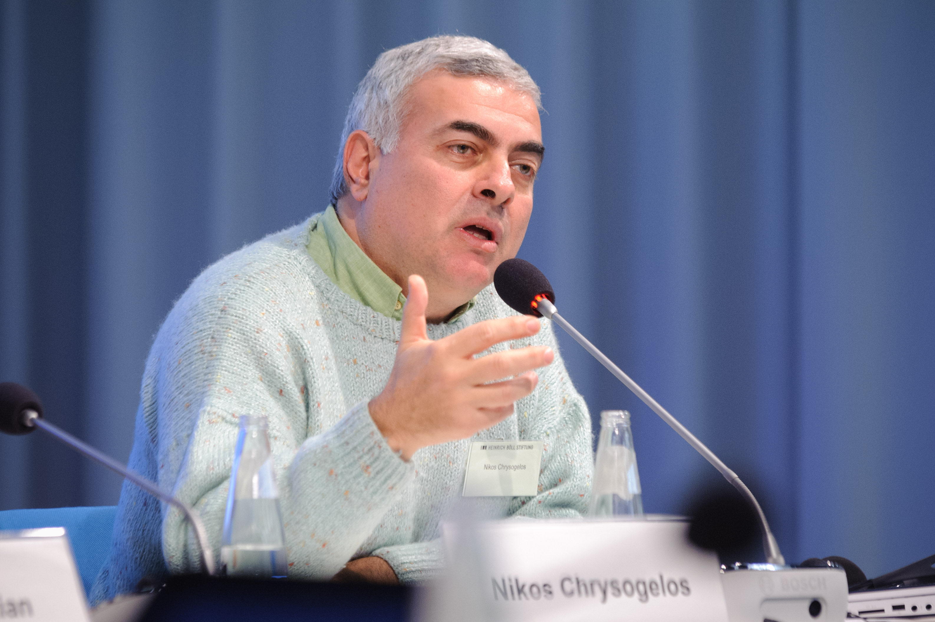 Nikos Chrysogelos (MdEP, Grüne Partei Griechenlands) Foto: Stephan Röhl